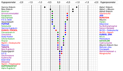 Eiweissprofil